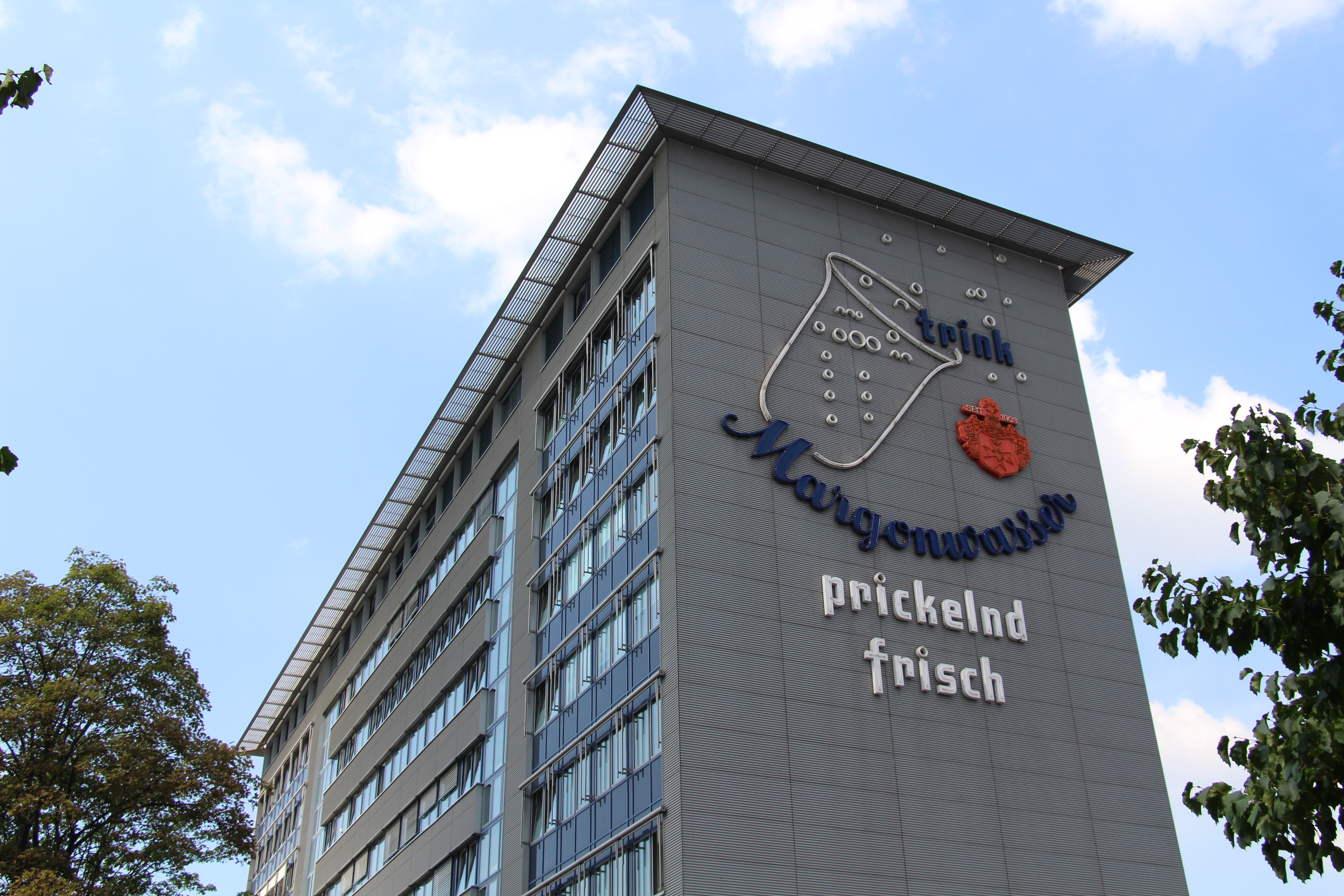 Seevorstadt West. Reitbahnstraße Margonwasser advert